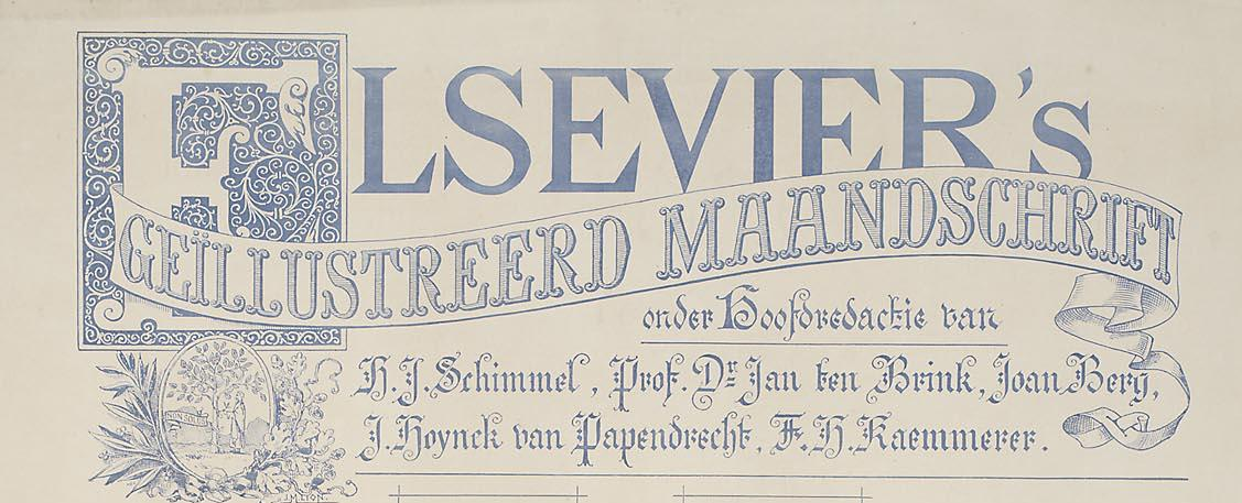 Deel van een affiche: Elsevier's Geïllustreerd Maandschrift. Tekst: Elsevier's Geïllustreerd Maandschrift onder Hoofdredactie van H.J. Schimmel Prof. Dr. Jan ten Brink, Joan Berg, J. Hoynck van Papendrecht, F.H. Kaemmerer.